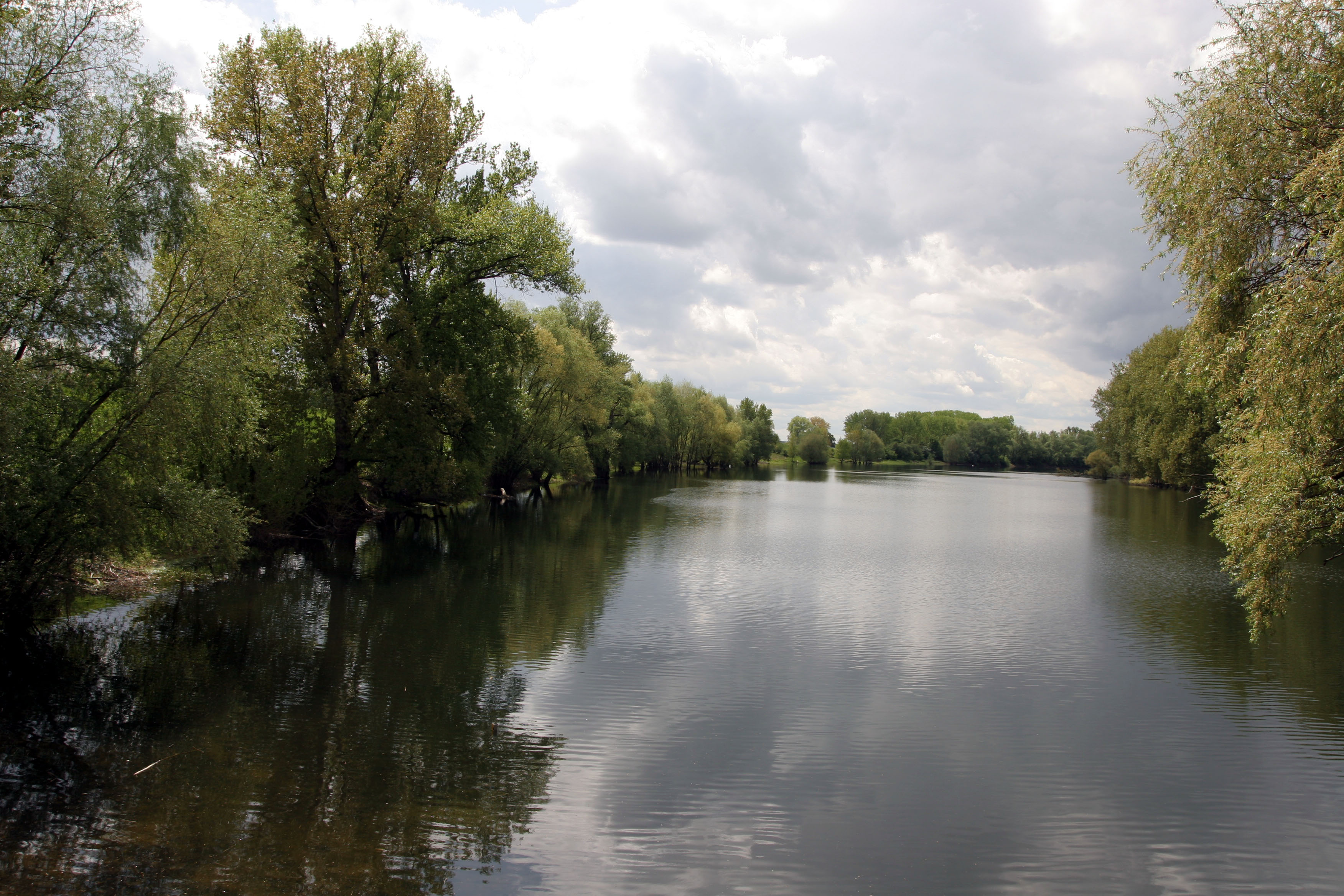 Ein Teil des Altrheinarmes im (oder am) Naturschutzgebiet „Lampertheimer Altrhein“ (Biedensand) in Lampertheim